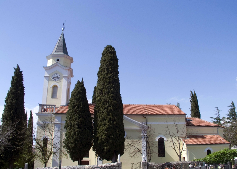 Župna crkva Svete Katarine djevice i mučenice u Selcu treća je sagrađena crkva u Selcu. Sagrađena i blagoslovljena 7. studenoga 1888. godine. Godine 1913. drvenu kupolu zvonika srušila je bura i zamijenjena je s "cement betonskom". Župna crkva Svete Katarine sagrađena je u stilu historicizma. U njoj se nalaze brojni značajni umjetnički radovi, orgulje, barokna krstionica, te barokni relikvijar s moćima Sv. Katarine. 500. obljetnica proslavljena je 19. travnja 1998